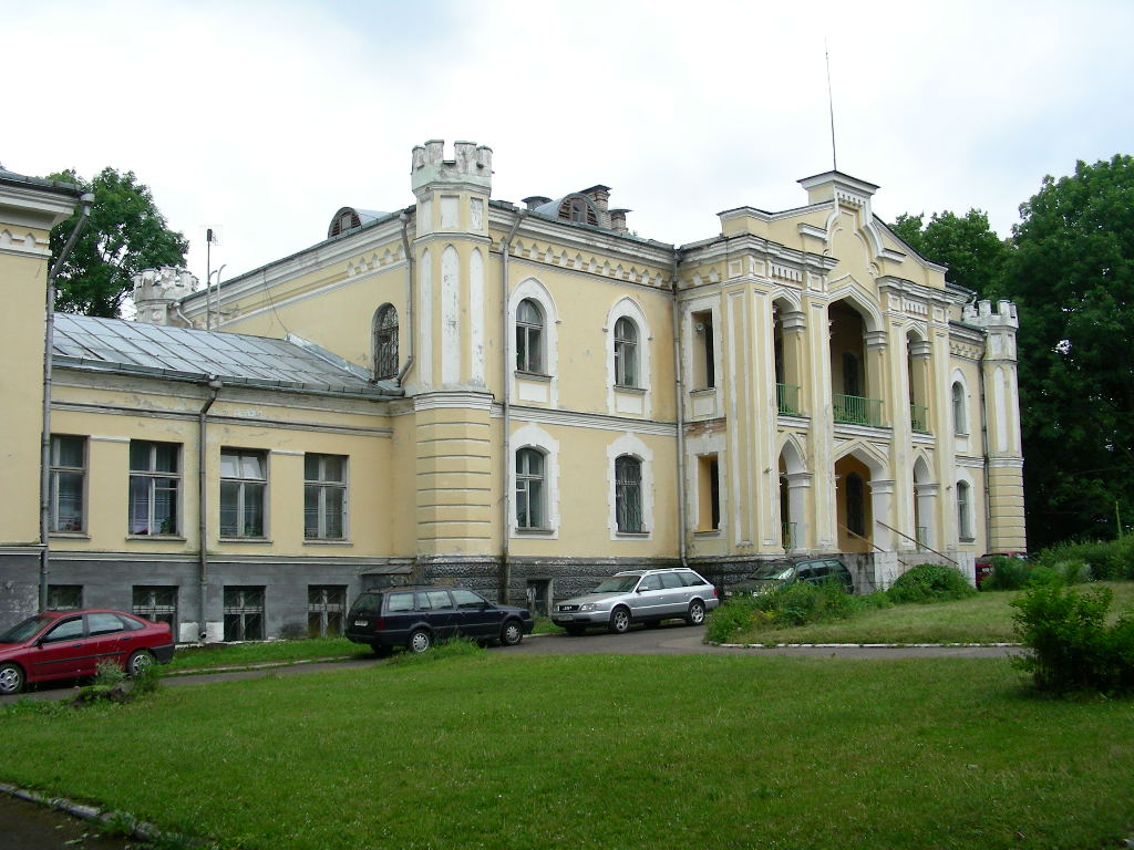 Беларуская (тарашкевіца): Палацава-паркавы комплекс:палацгаспадарчыя пабудовыпарк. в. Прылукі This is a photo of Belarusian heritage monument. Reference number: 612Г000370 ( WLM)